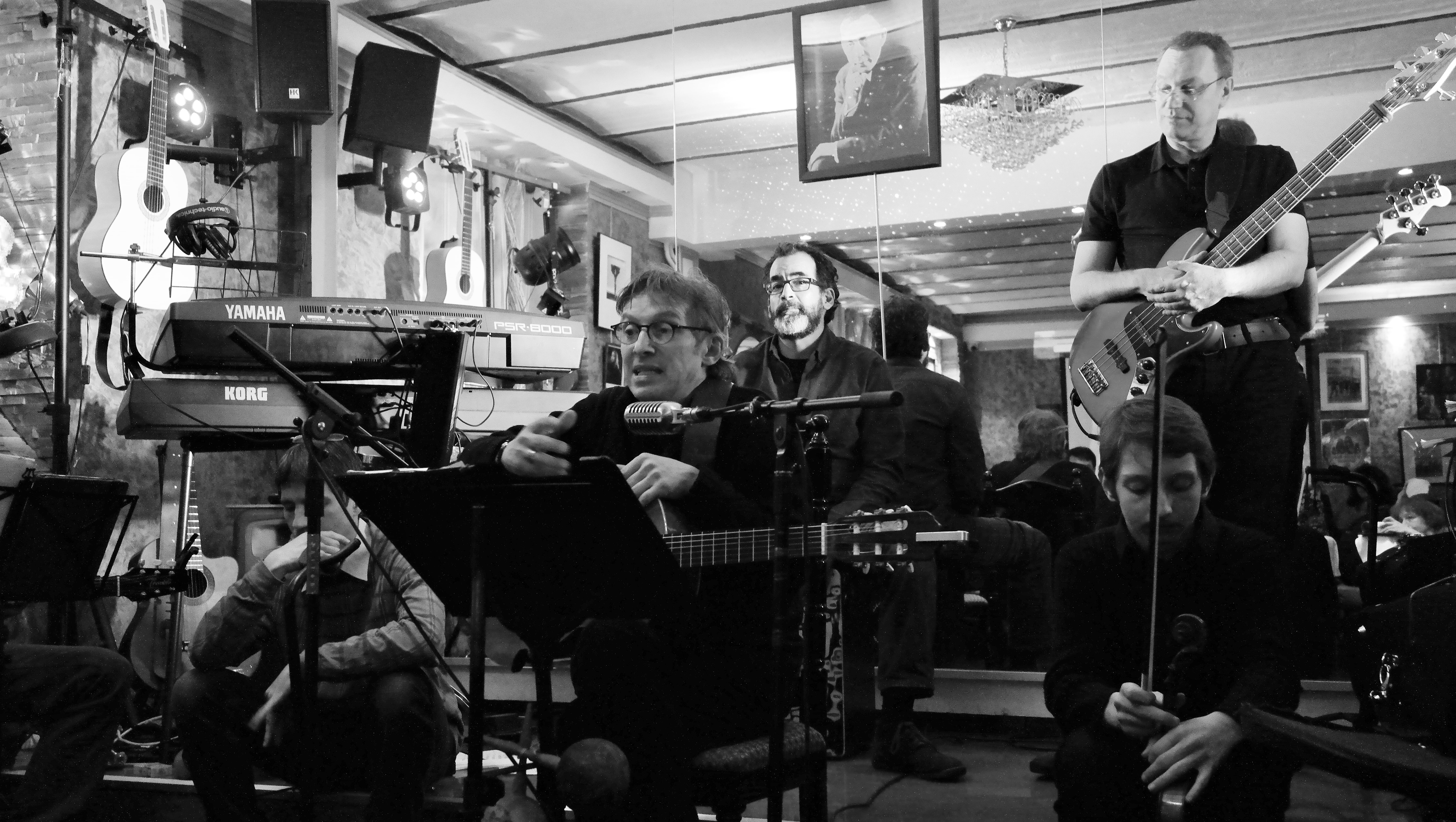 Izolator, концерт в Cantine Russe, январь, 2016